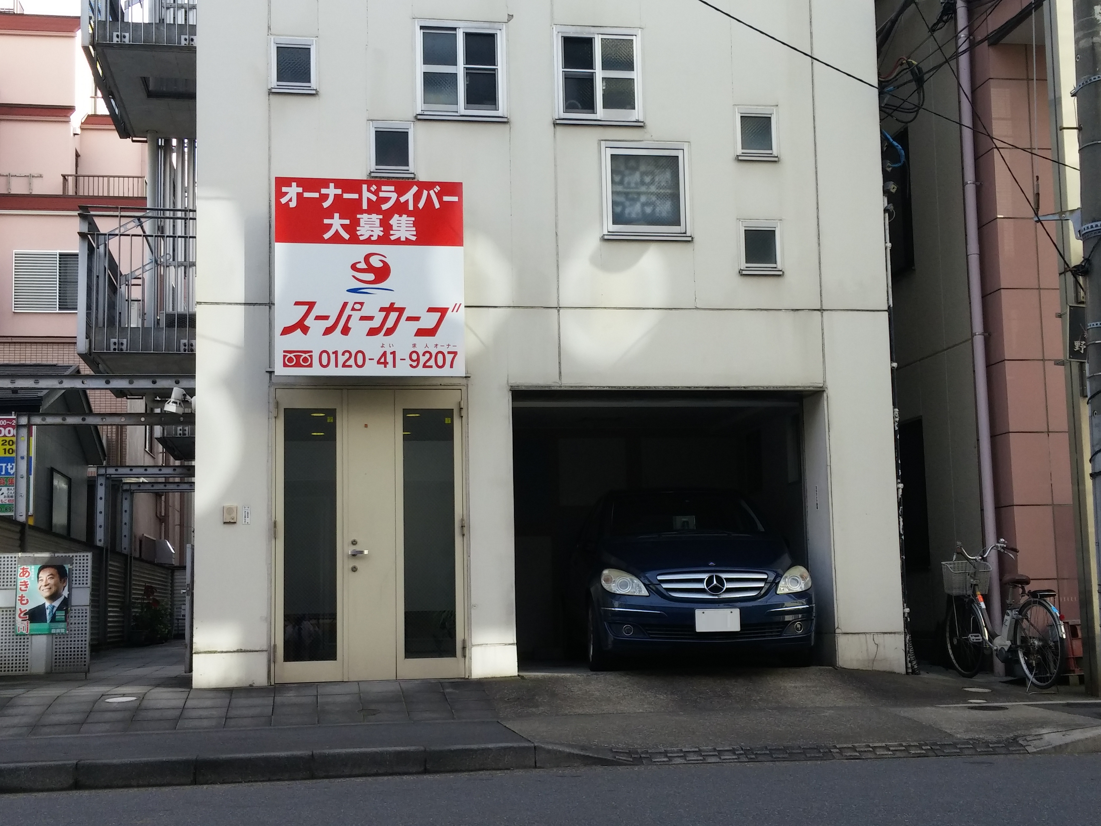 アネックス城東配車センター